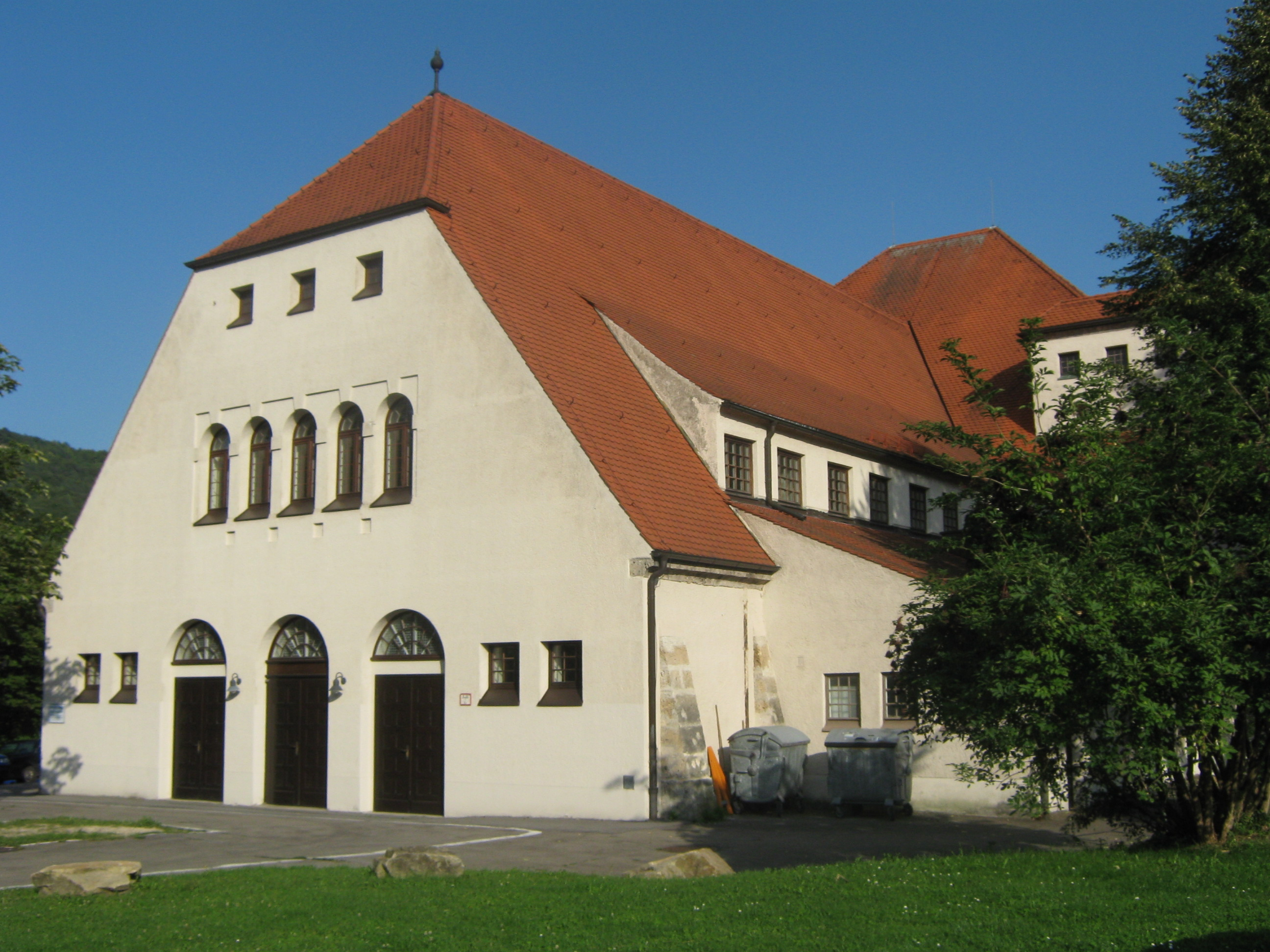 Die Pfullinger Hallen wurden 1904-1907 vom Architekt Theodor Fischer in Pfullingen als Ton- und Festhalle in erbaut. Gestiftet wurde der Gebäudekomplex in der Klosterstr. 110 vom Geheimrat Louis Laiblin. Sanierung von 1986-1989.